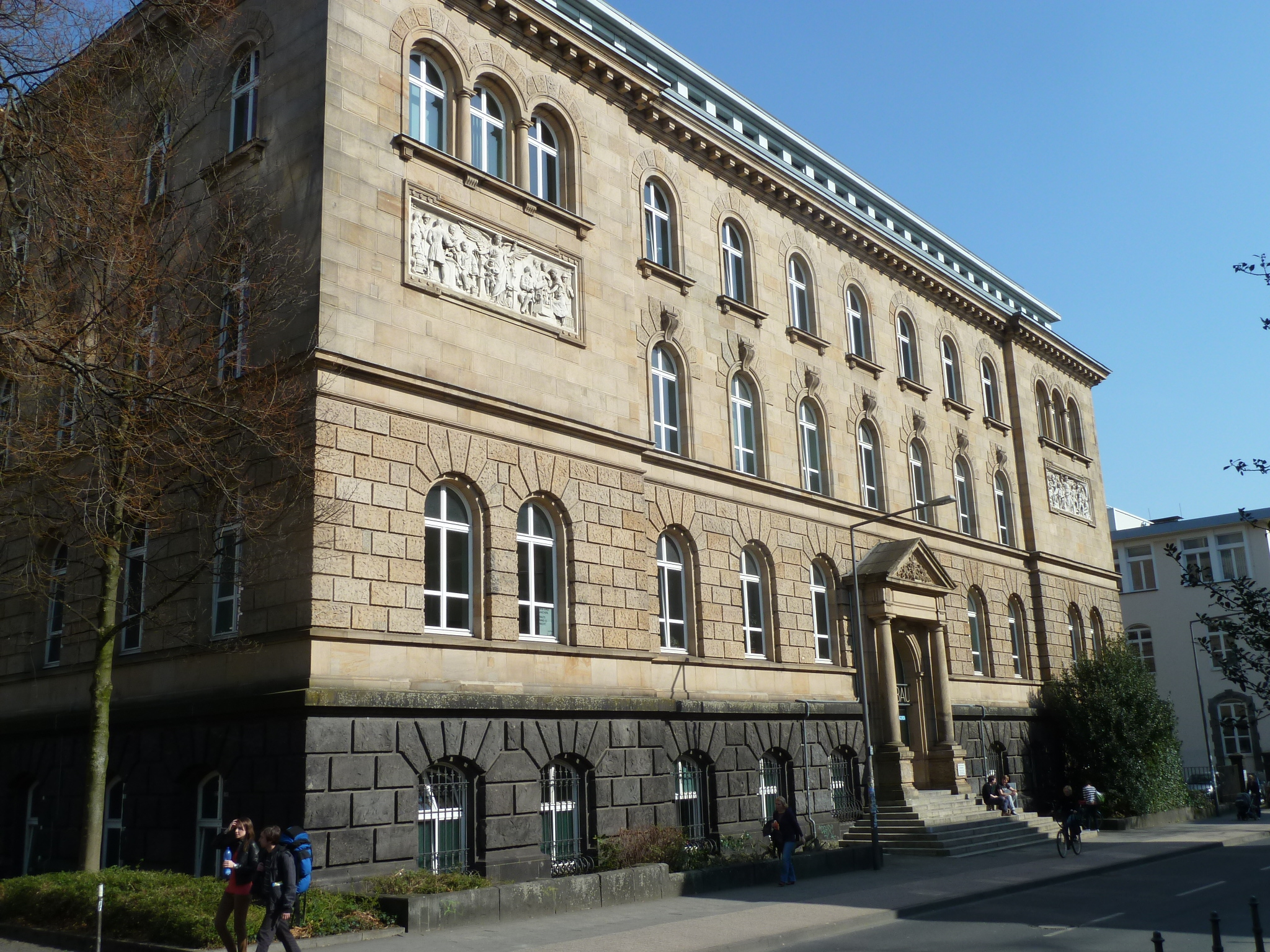 Bergbauinstitut der RWTH Aachen in der Wüllnerstrasse